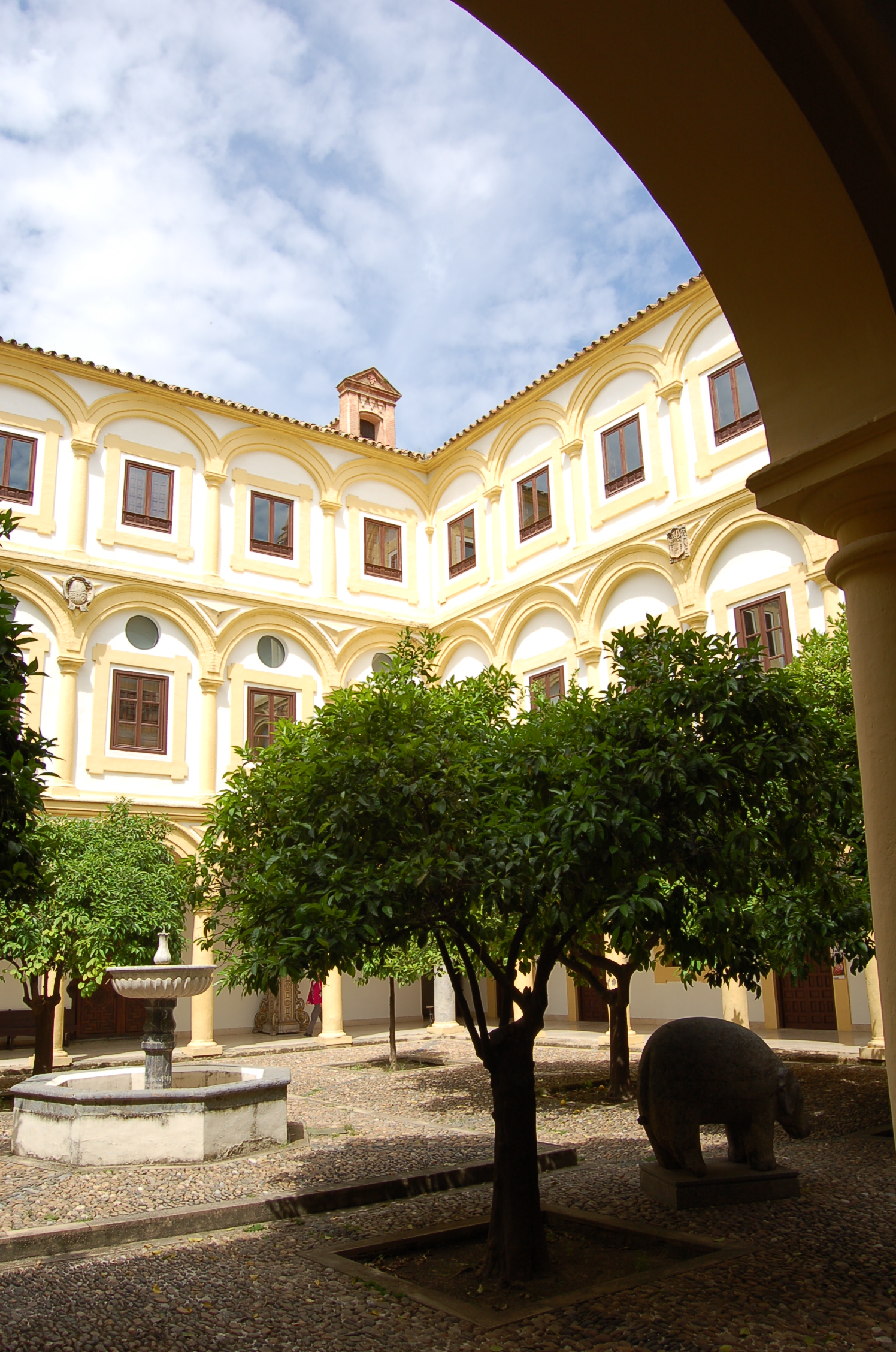 Córdoba (España).